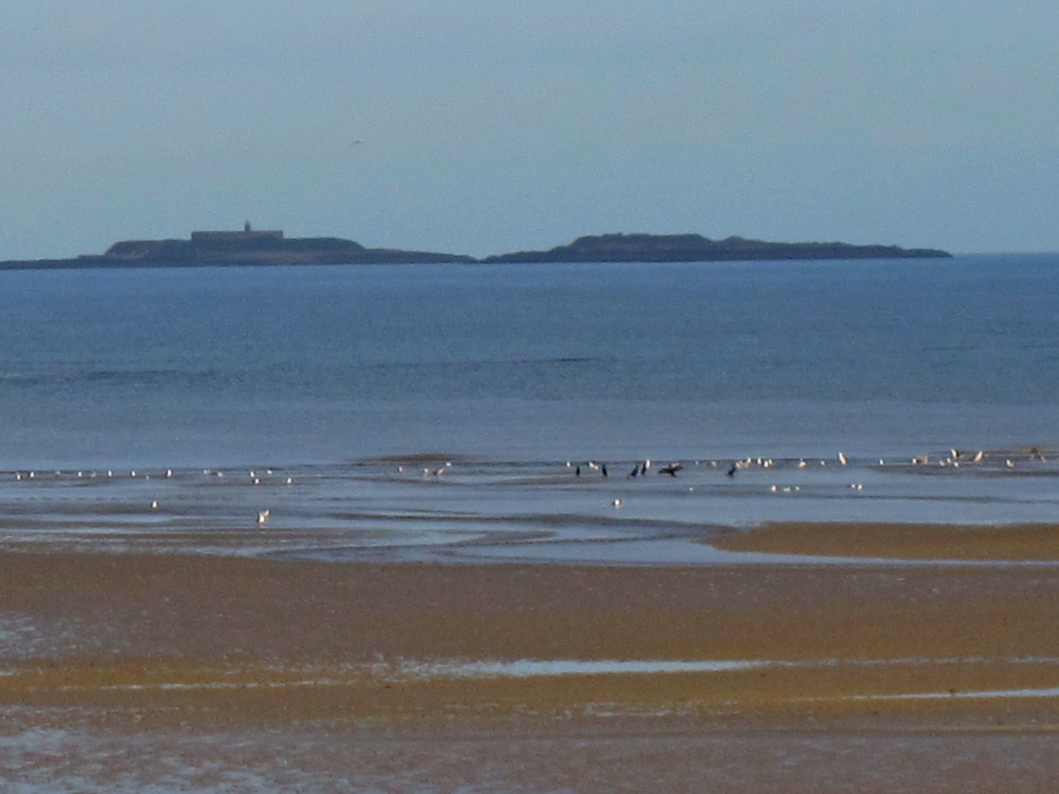 Ravenoville